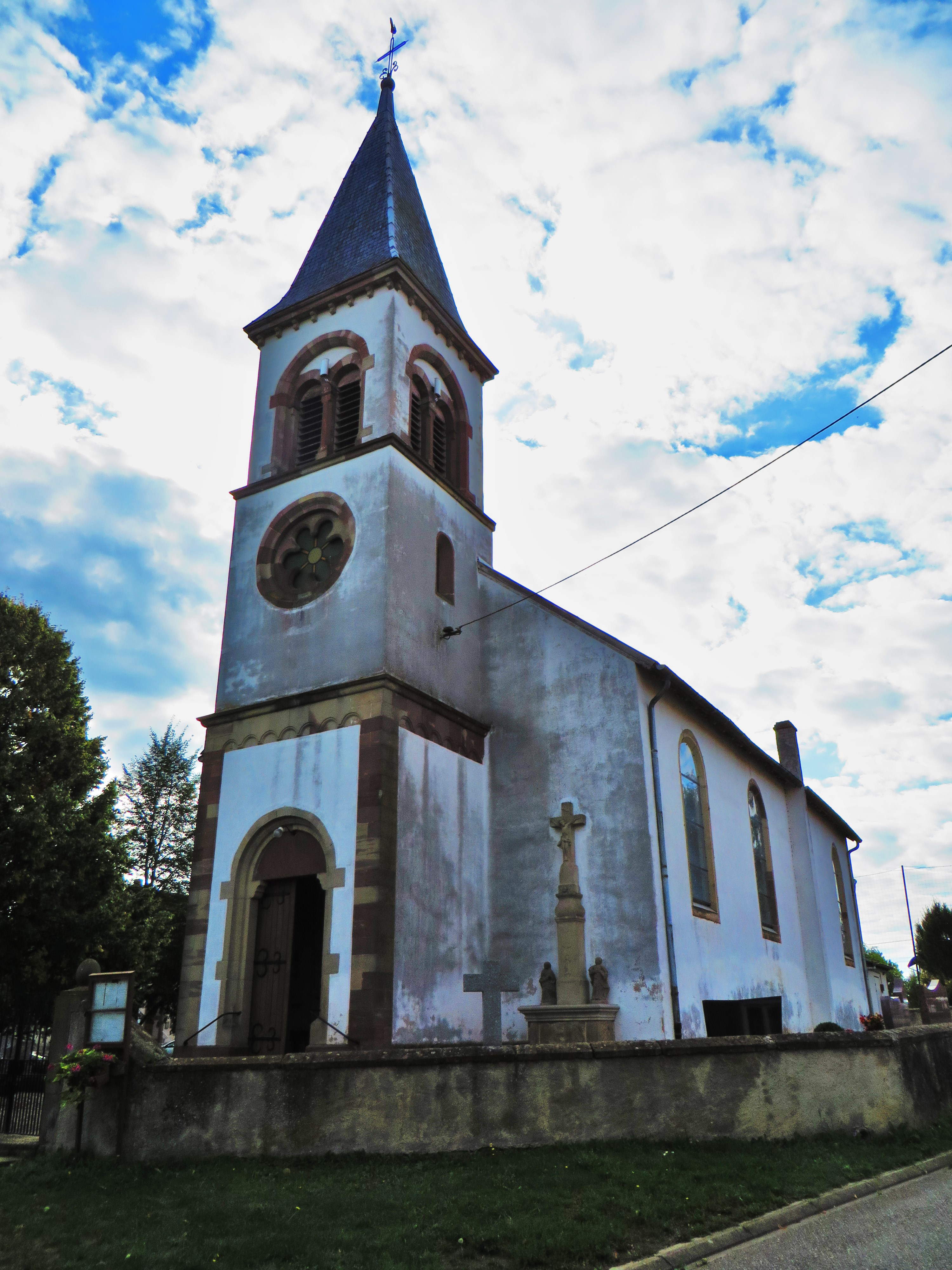 Kirviller l'église Saint-Michel